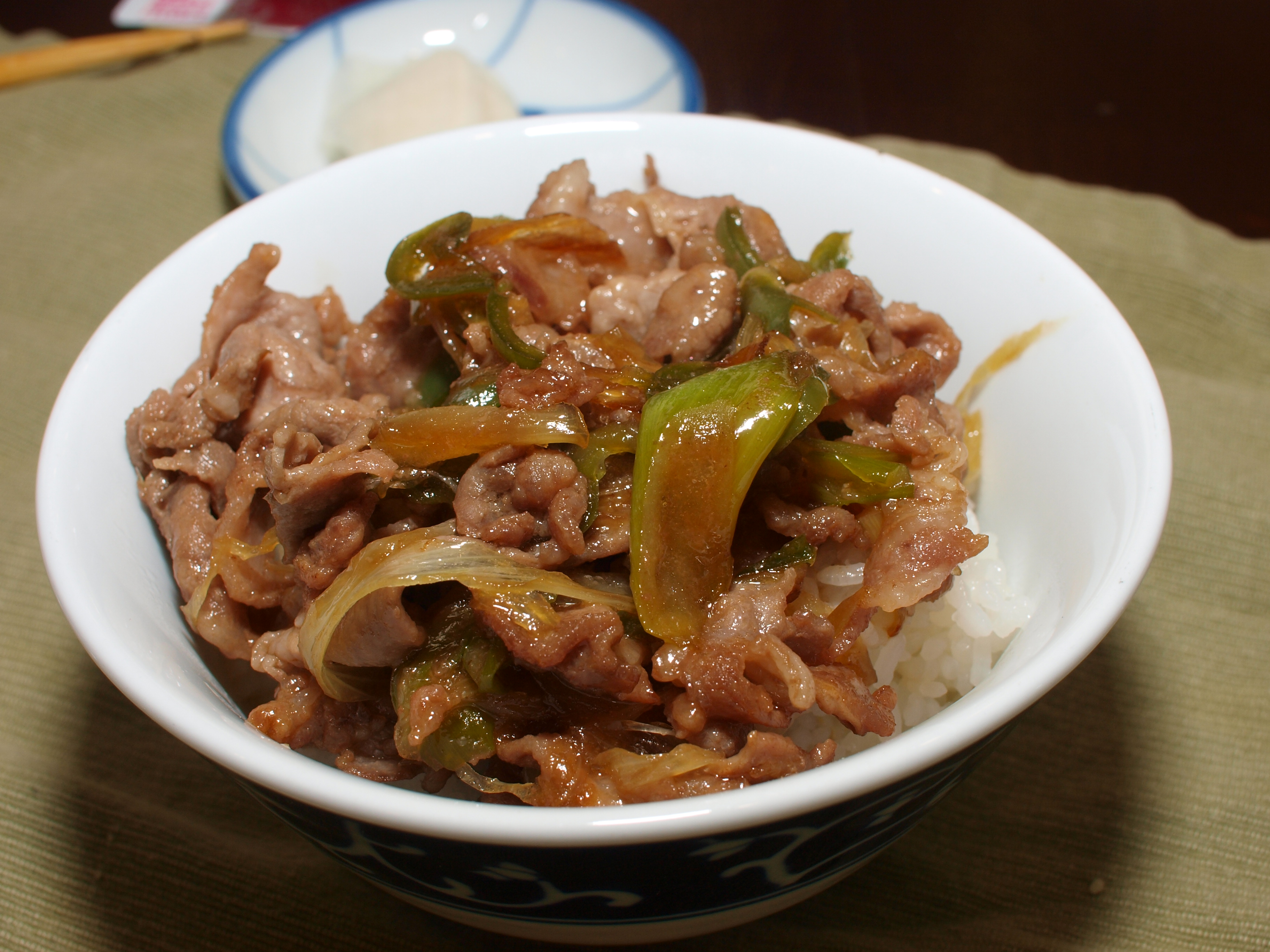 Quick lunch